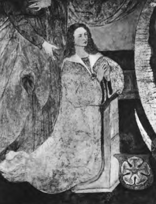 Freska zobrazující Jindřicha IV: z Hradce, kaple Panny Marie na jindřichohradeckém zámku.